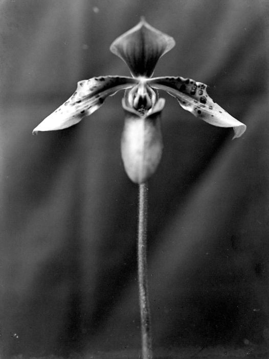 Repronegatief. Borneo-orchidee (Paphiopedilum bullenianum)